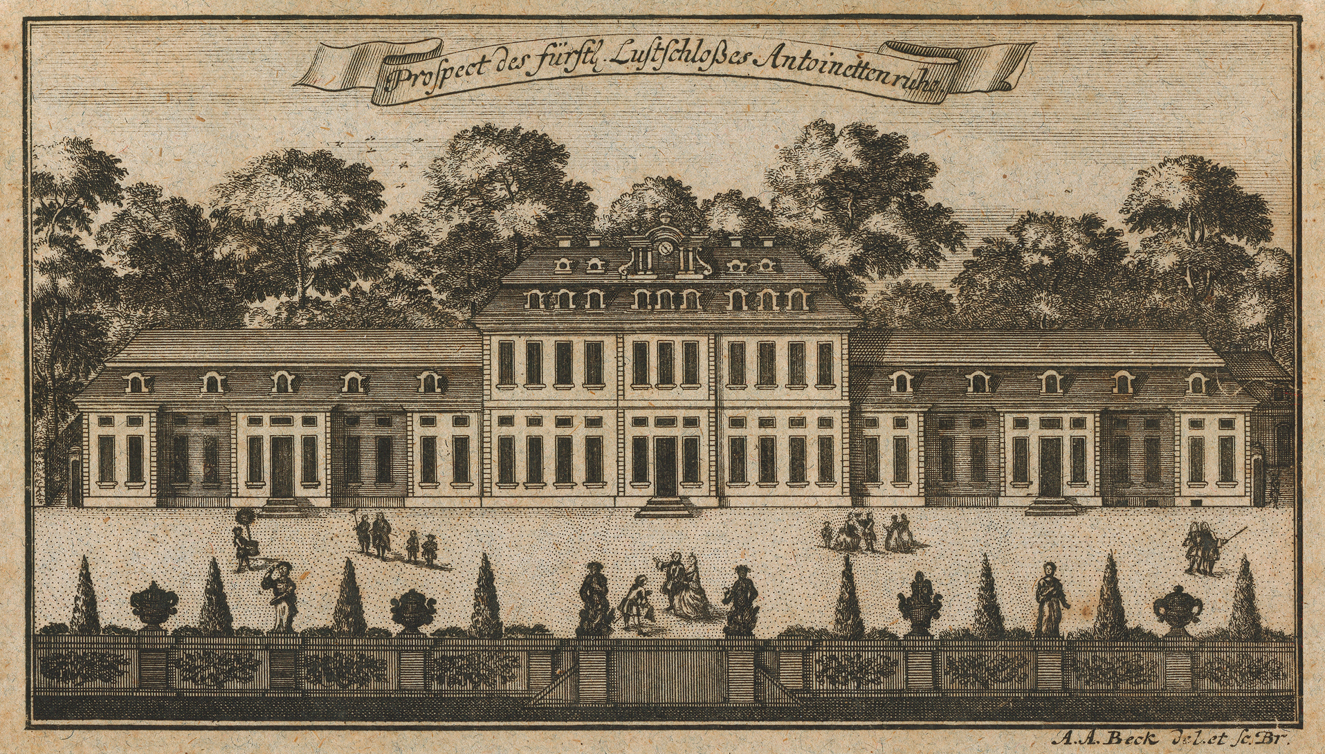 Anton August Beck, Hofkupferstecher: Prospect des fürstl. Lustschloßes Antoinettenruhe (A. A. Beck del. et. sc. Br.), 16 x 9 cm, ca. 1765, Scan vom Original von Donkey shot